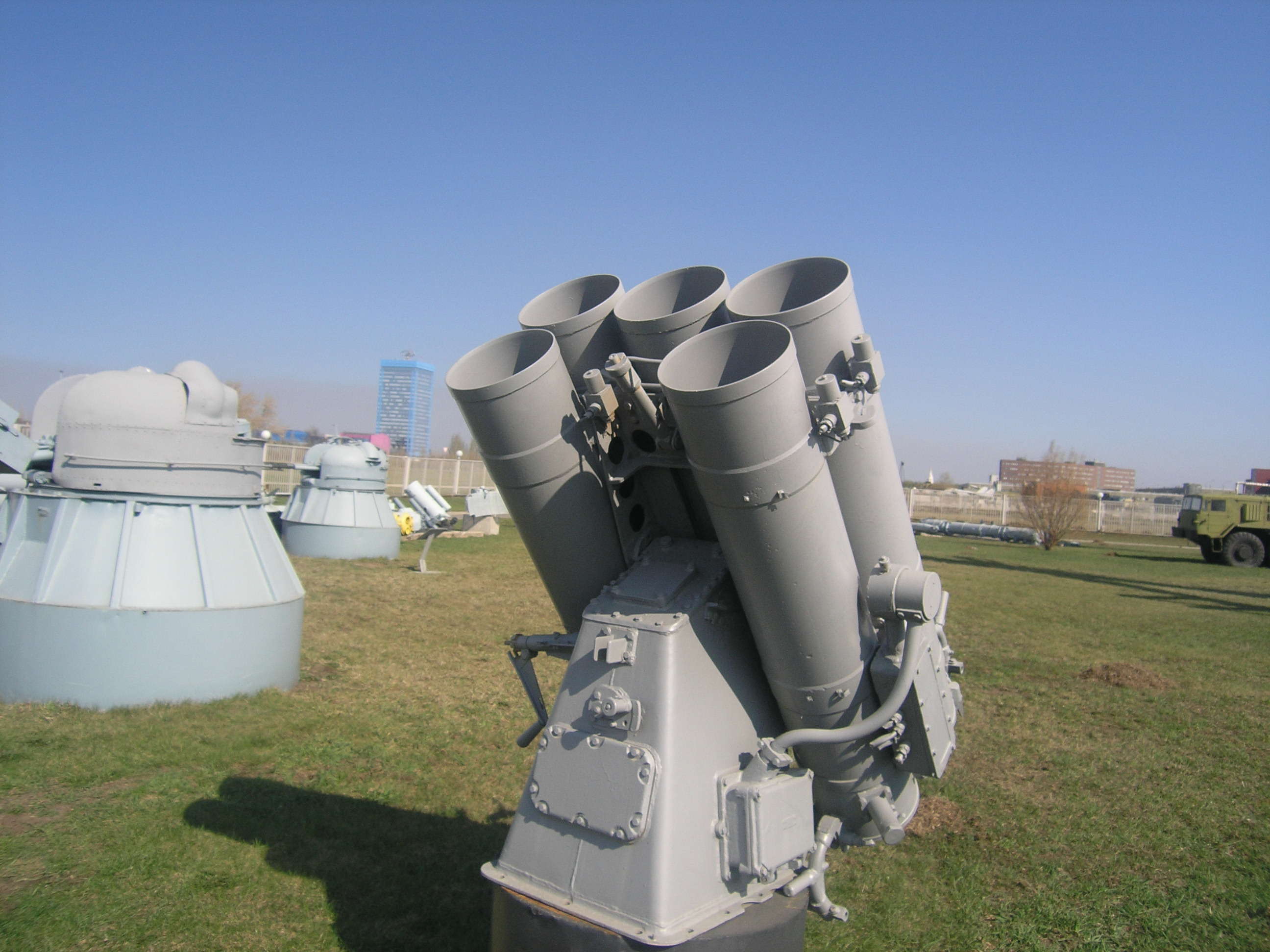 РБУ-1200 в Техническом музее Тольятти.